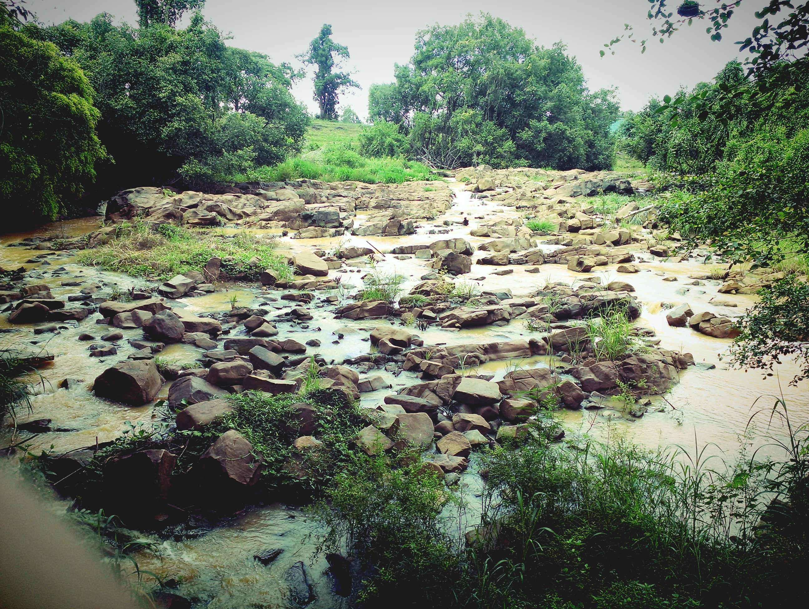 dòng 1